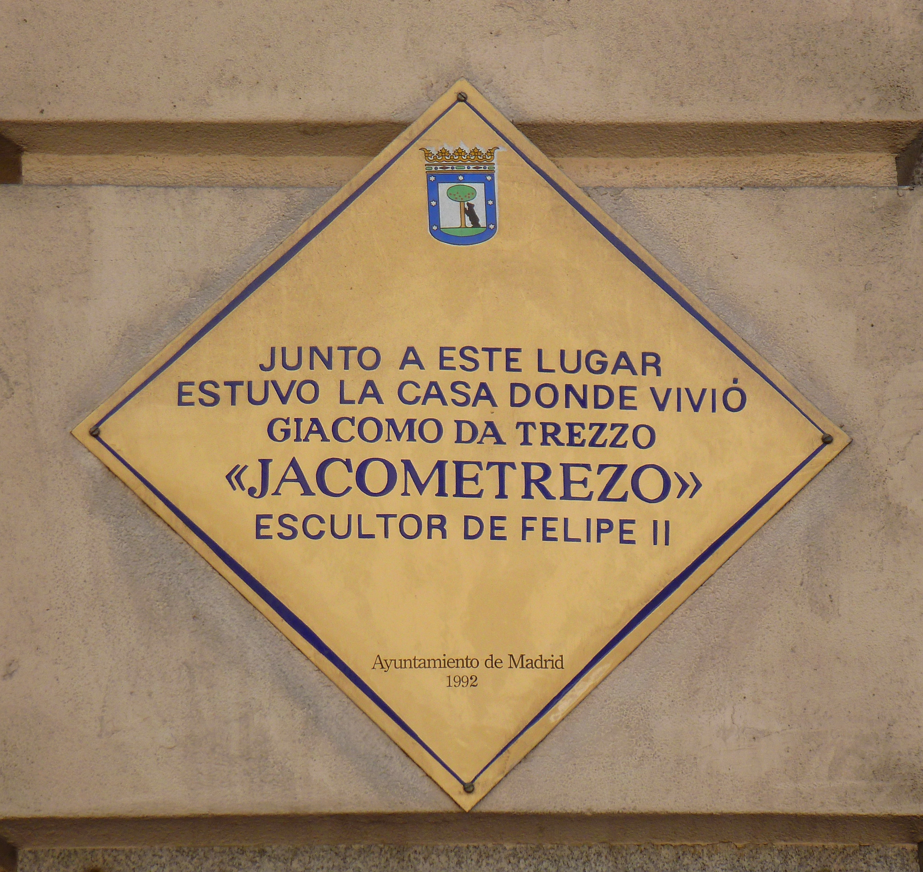 Placa conmemorativa del escultor Jacometrezo en la Casa Matesanz de la Gran Vía de Madrid.